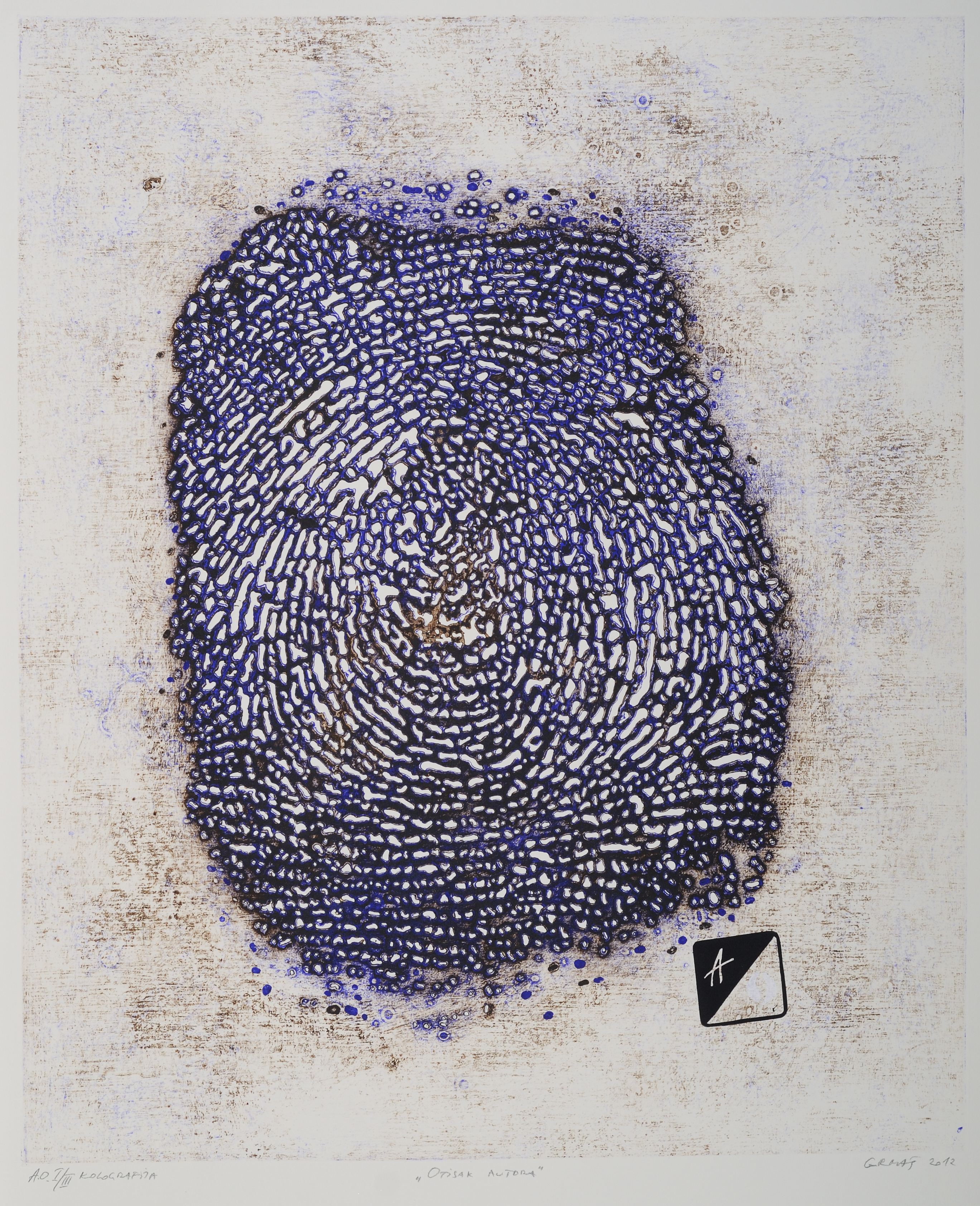 Srpski (latinica): Zoran Grmaš, Otisak autora II, 2012, (kolografija), 80x66